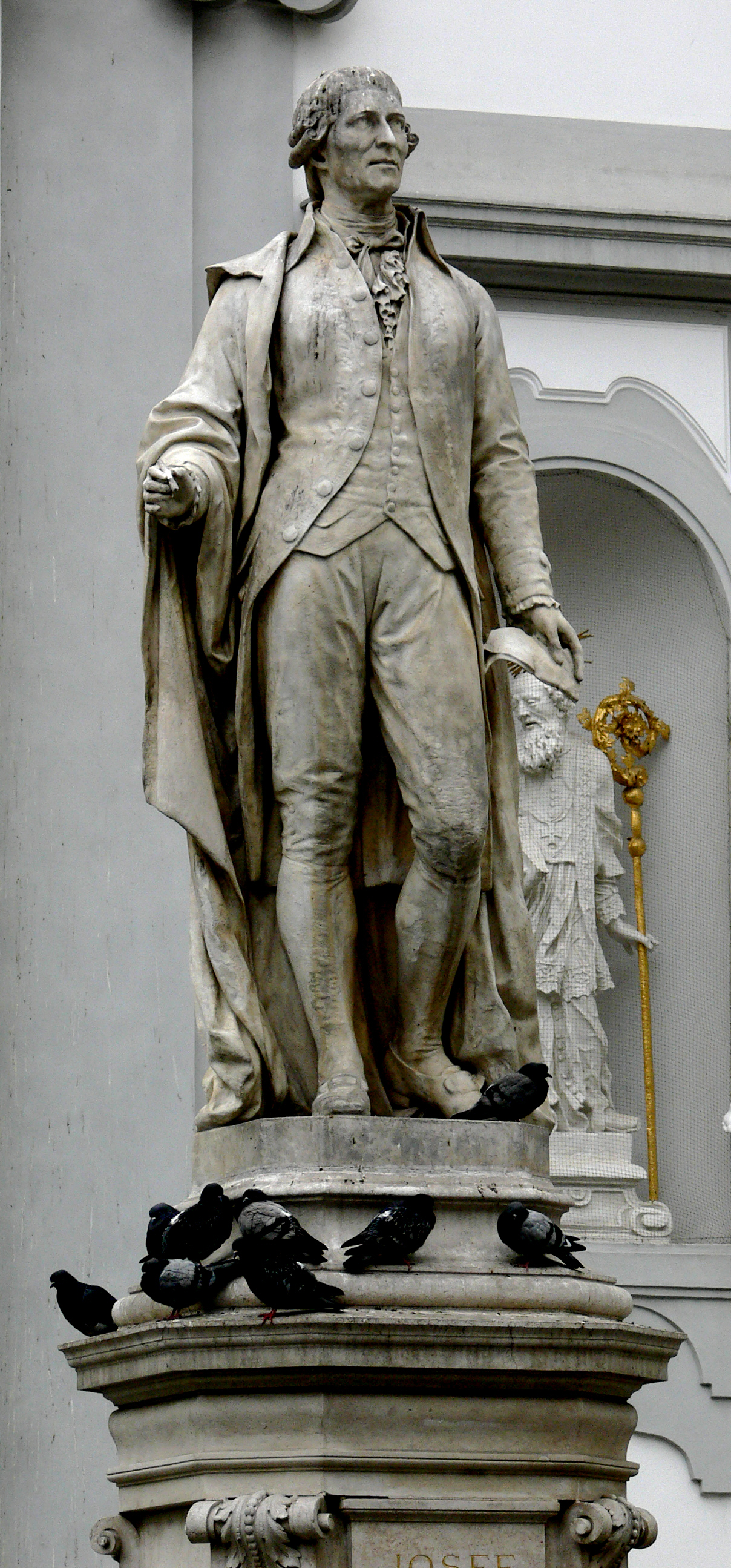 Wien, Mariahilfer Straße, Haydn-Denkmal vor der Mariahilfer Kirche